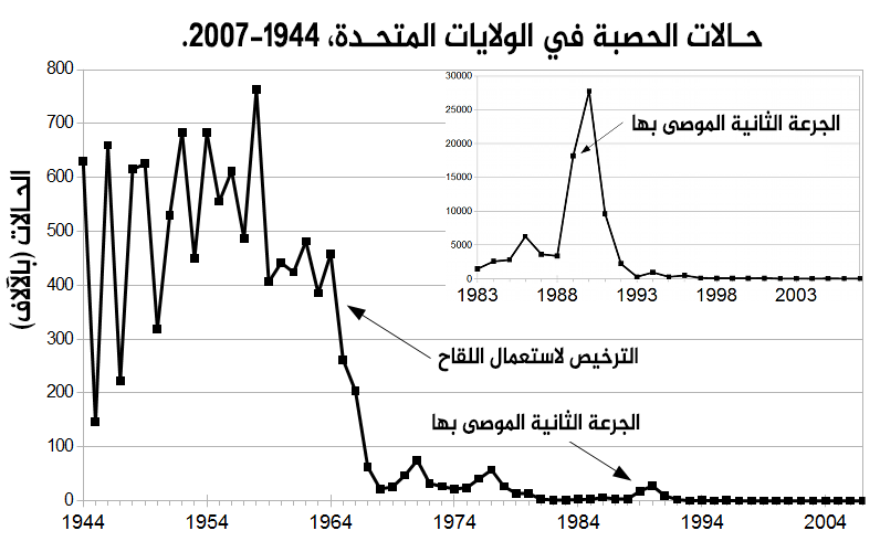 عدد حالات الإصابة بالحصبة في الولايات المتحدة بين 1944-2007